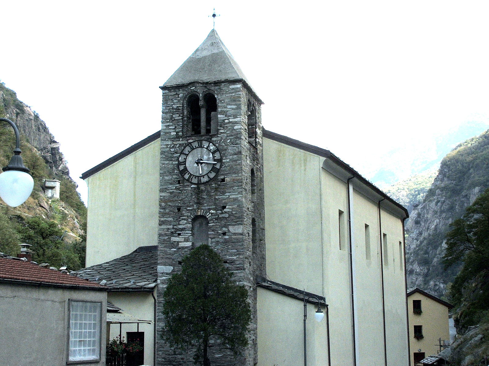 Valle d'Aosta - Bard (Forte di Bard e Museo delle Alpi di Bard) Chiesa parrocchiale